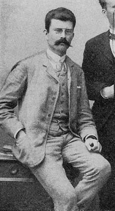 Paul Rosenius (1865-1957) foto från ca. 1900.